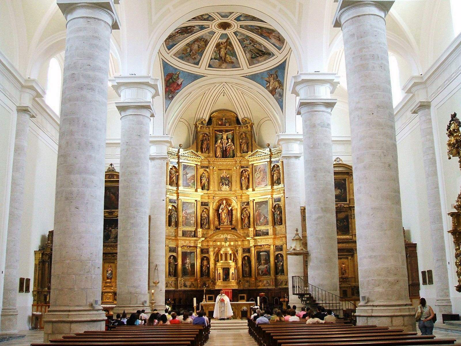 Getafe - Catedral de Nuestra Señora de la Magdalena